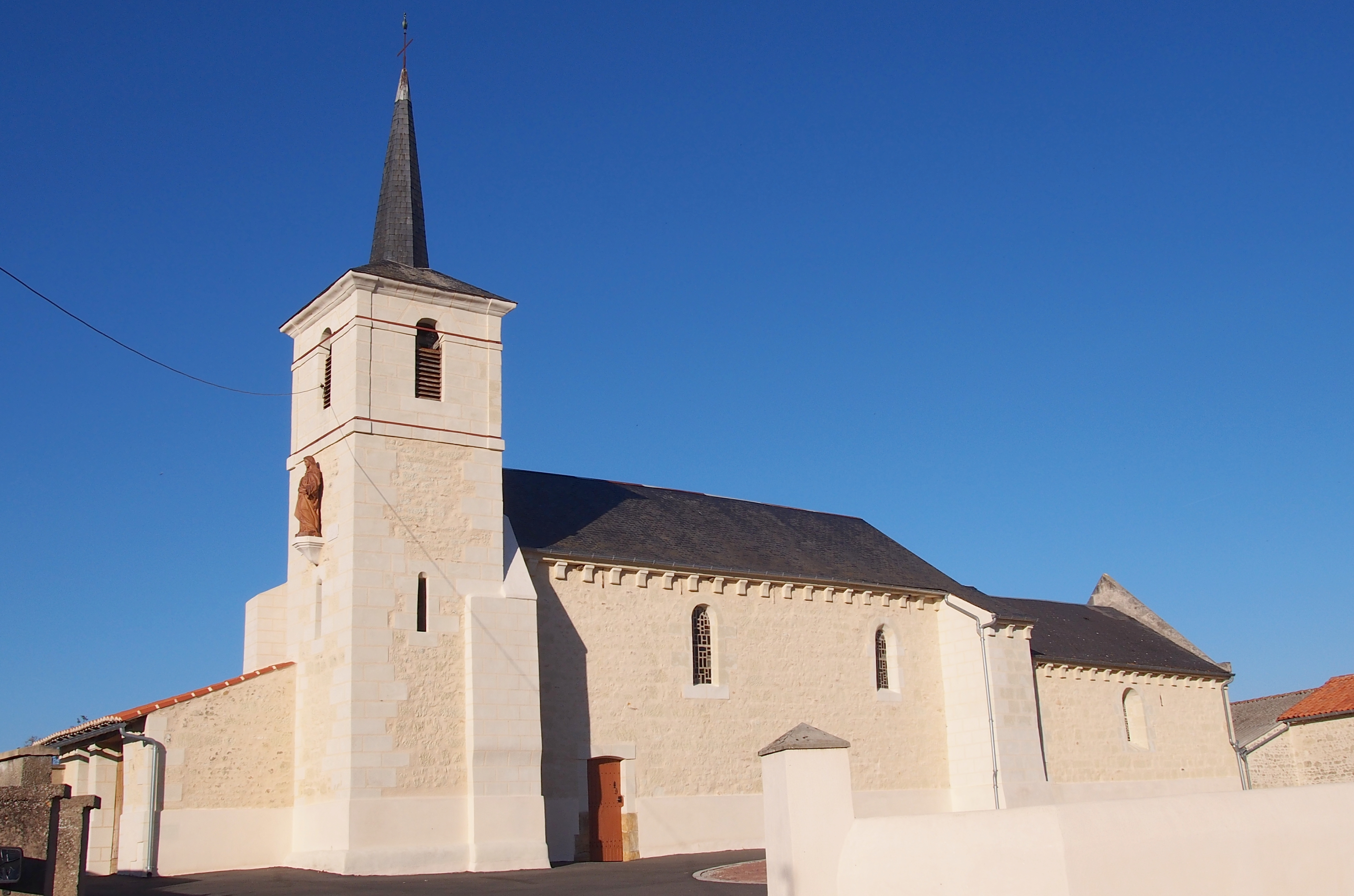 Saint-Cyr-la-Lande (Nouvelle-Aquitaine, France). L'église Saint-Cyr.